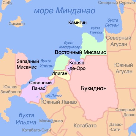 Карта провинций региона Северный Минданао (Филиппины)